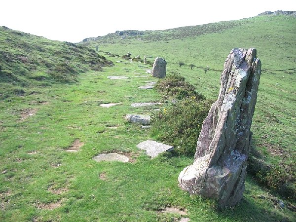 port de velate (baztan)